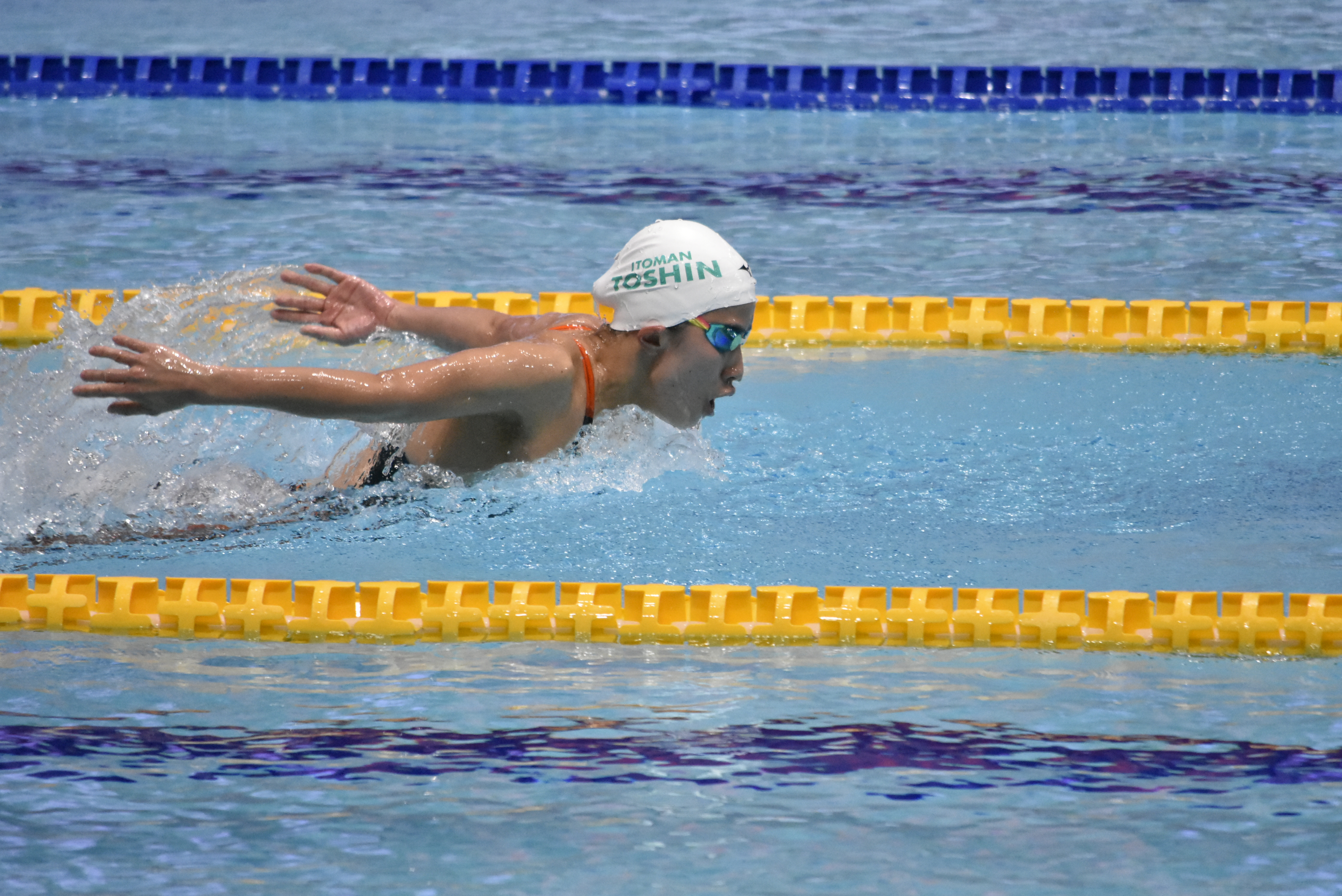 大橋 悠依